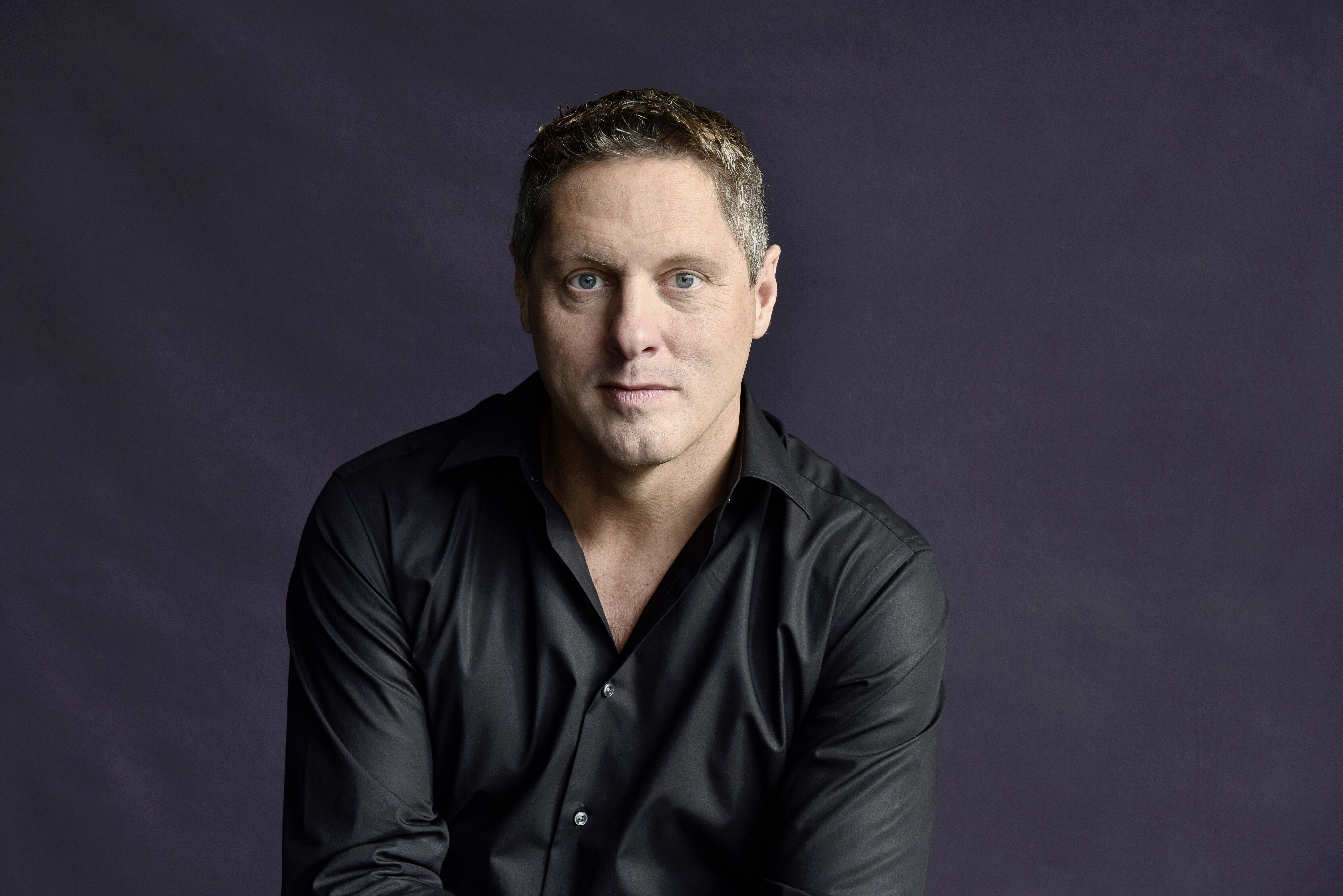 Chief Design Officer Daimler AG